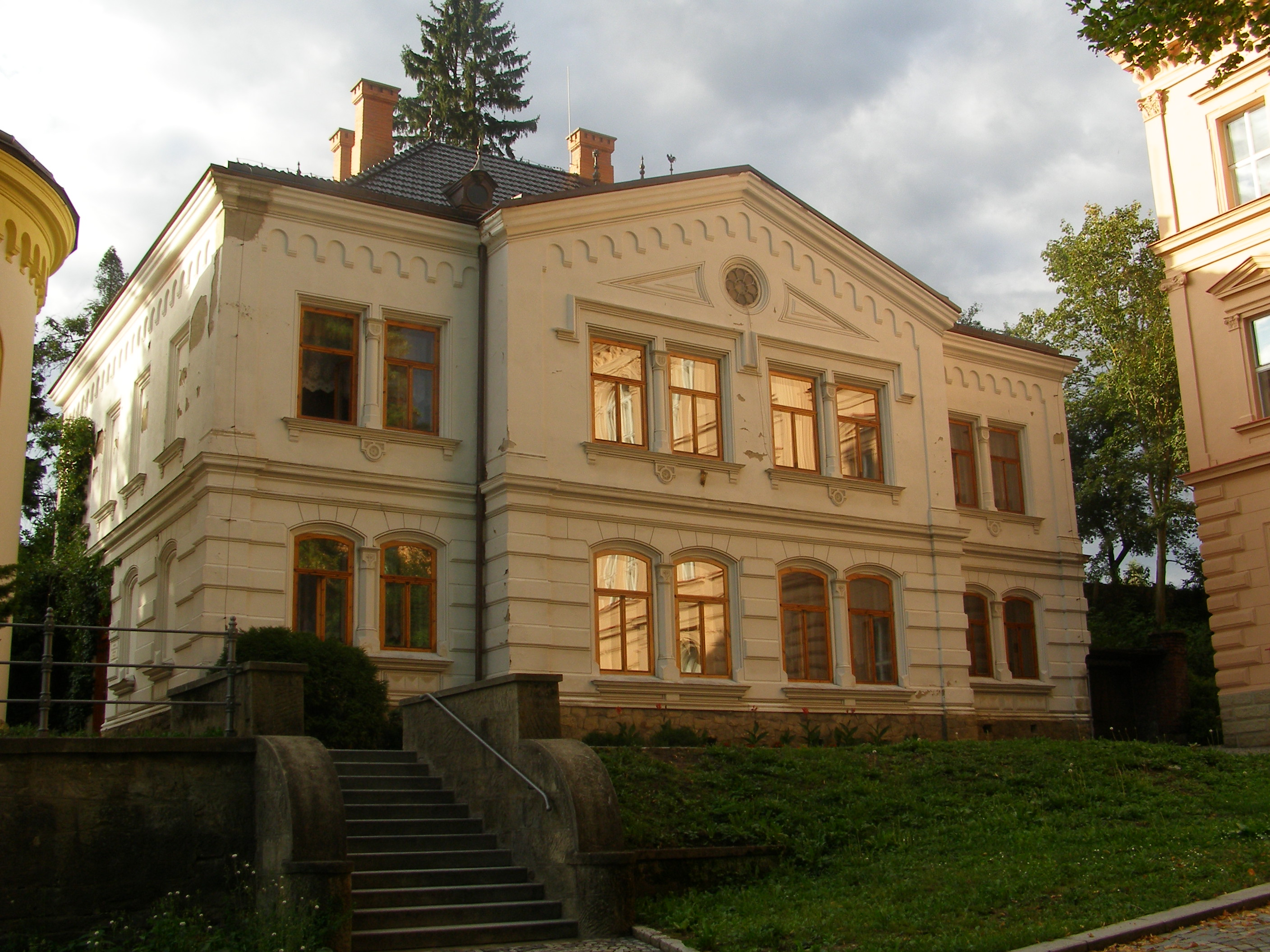 Fara (Vsetín), (na chrámovém okrsku na návrší Z od Horního náměstí), ul. Palackého č.p. 153, fara je umístěna v ose za Dolním sborem, Vsetín